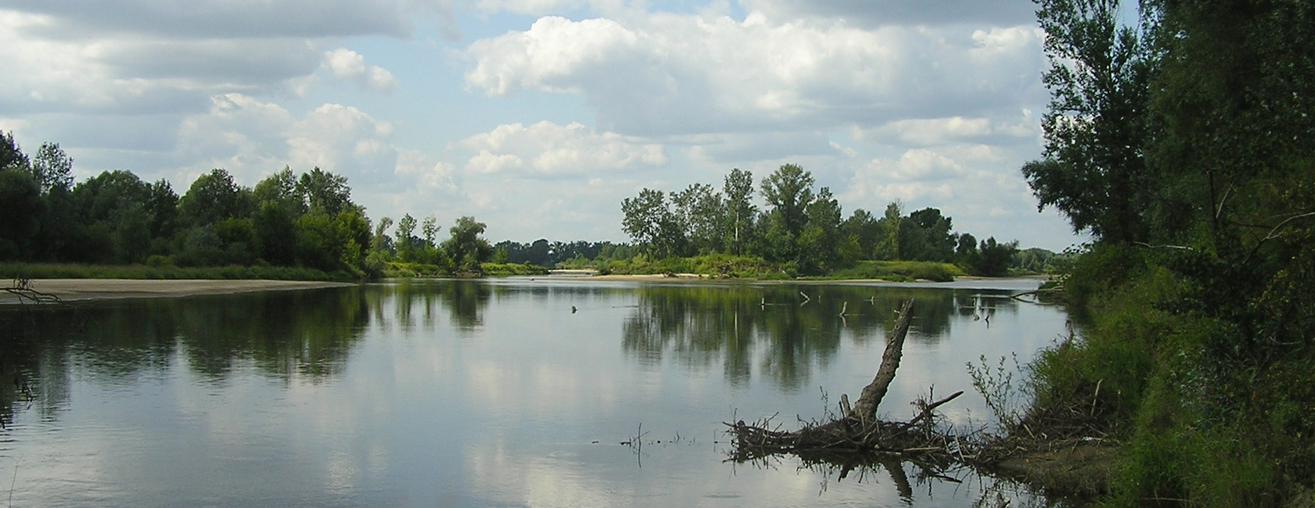 Zdjęcie wykonane 8 sierpnia 2009 r. z prawego brzegu Wisły, w kierunku północnym, w rezerwacie przyrody Wyspy Zawadowskie. Brzeg widoczny w lewej części zdjęcia stanowi fragment dużej wyspy usytuowanej w środku koryta rzeki, natomiast brzeg widoczny w środkowej części zdjęcia stanowi fragment małej wyspy usytuowanej w środku koryta Wisły. Zdjęcie wykonane zostało przy niskim poziomie wody. Według IMGW w dniu wykonania zdjęcia na wodowskazie Warszawa-Nadwilanówka zaobserwowano poziom 233 cm wody.